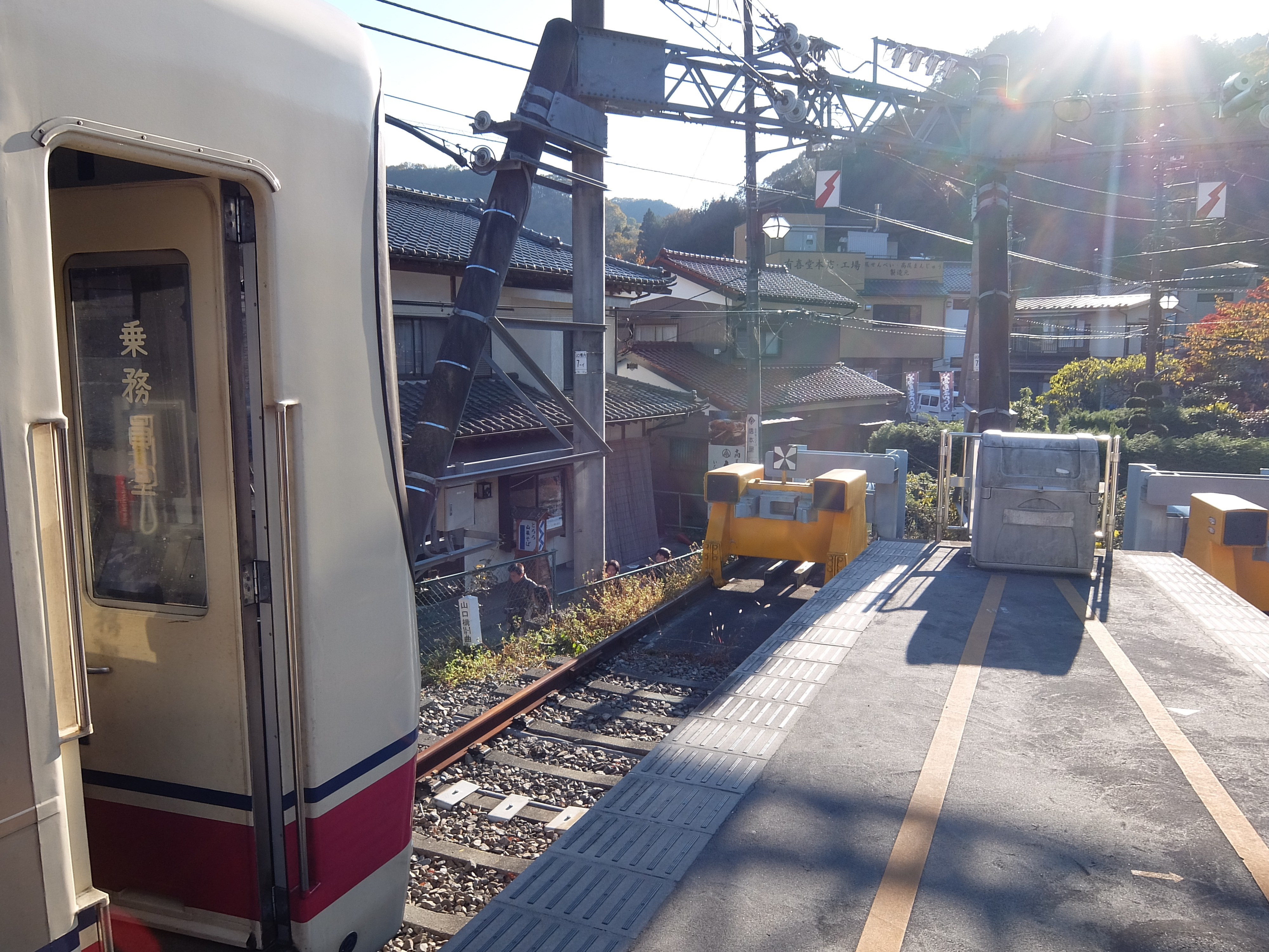 高尾山口駅 終端部